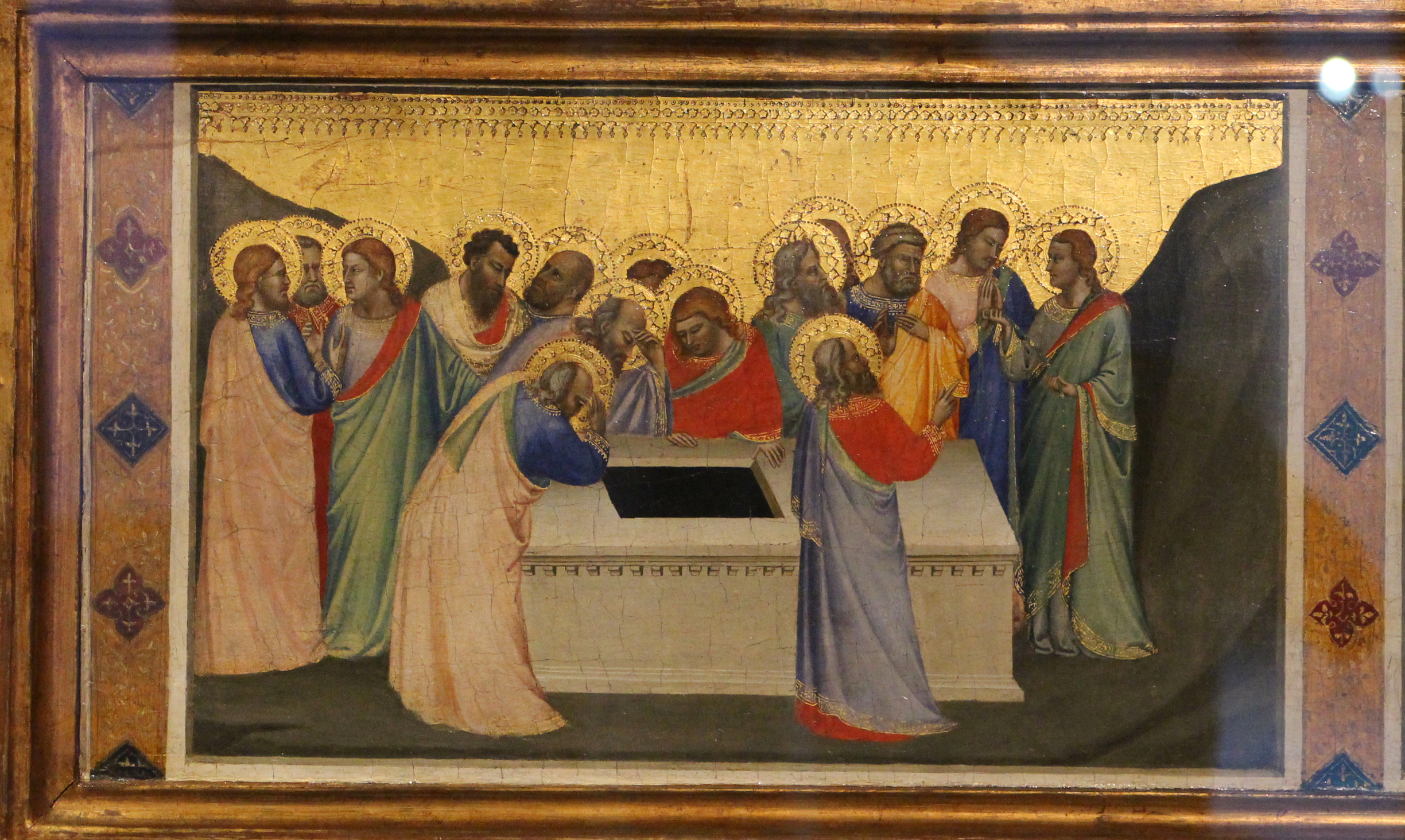 Bernardo Daddi, storie della vera Cintola, 1337-38, da altare maggiore duomo di Prato